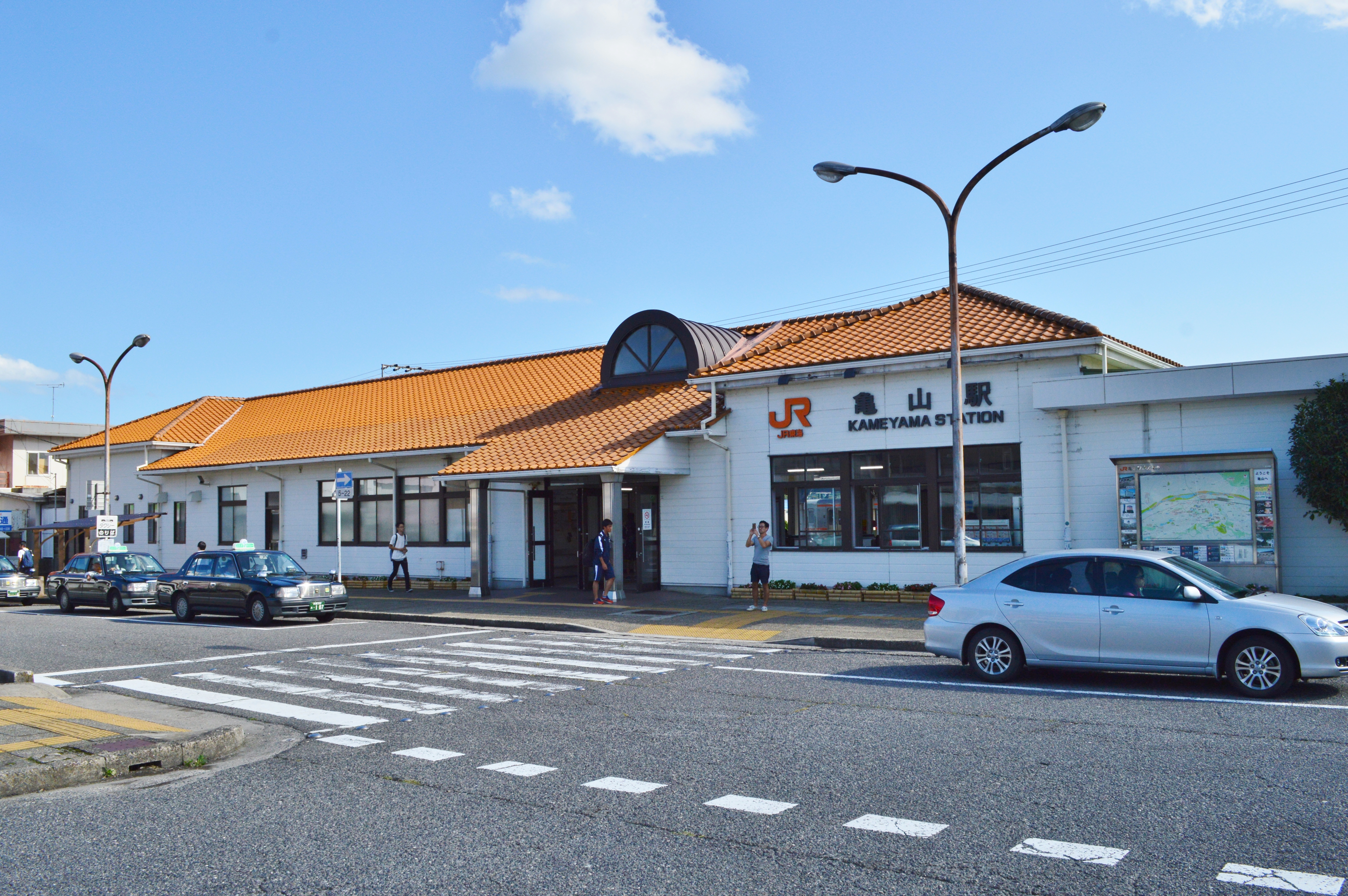 亀山駅 (三重県) 駅舎